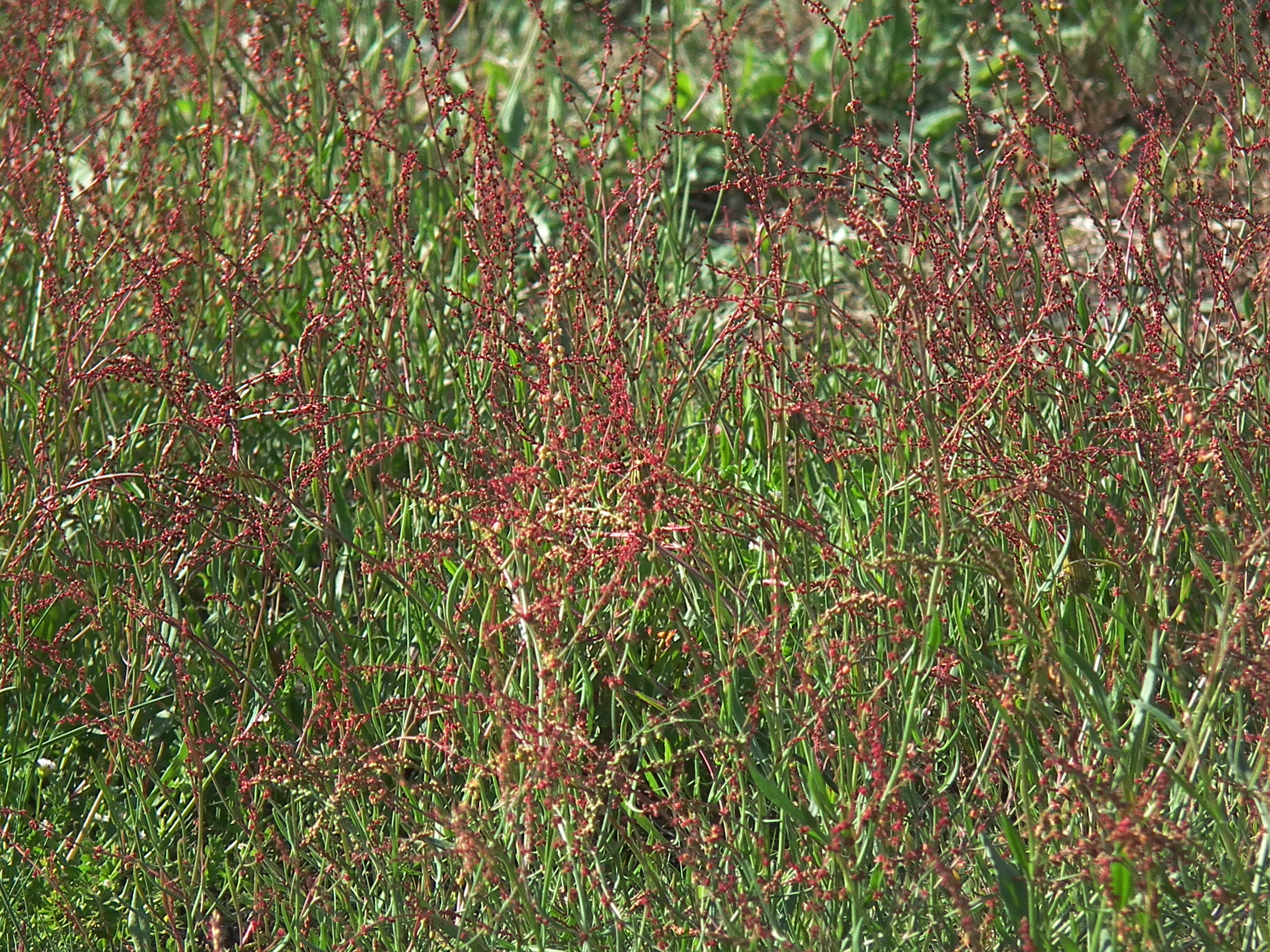 Kleiner Sauerampfer (Rumex acetosella) auf der Düne in Dudenhofen (Hessen, Deutschland), eventuell Besenheide (Calluna vulgaris)?